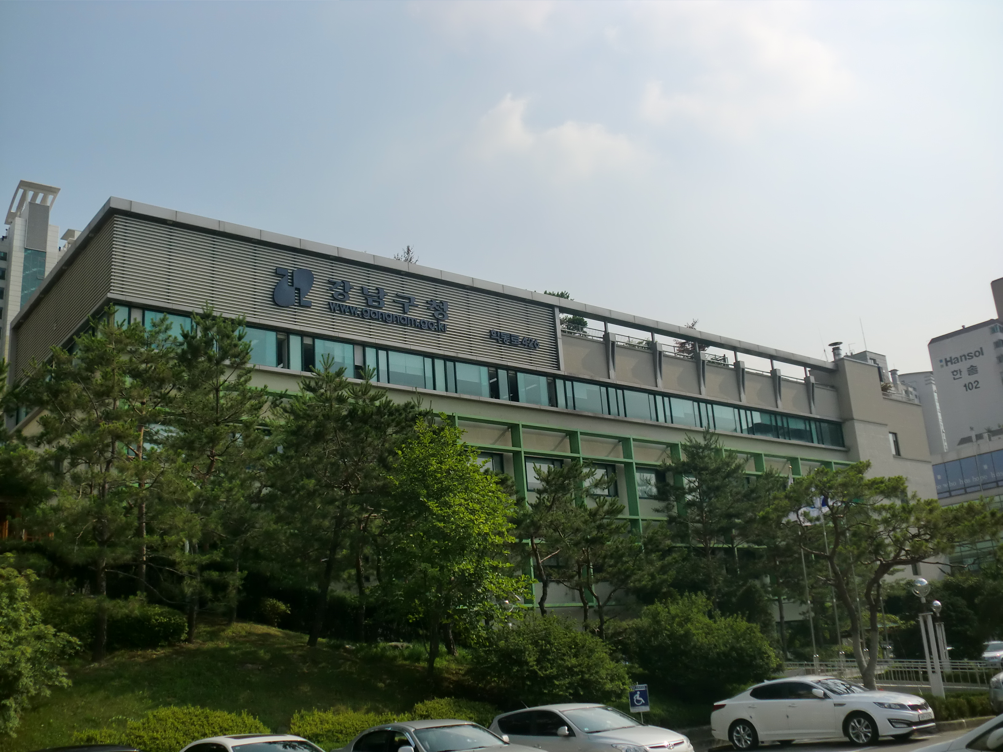 서울특별시 강남구에 있는 강남구청